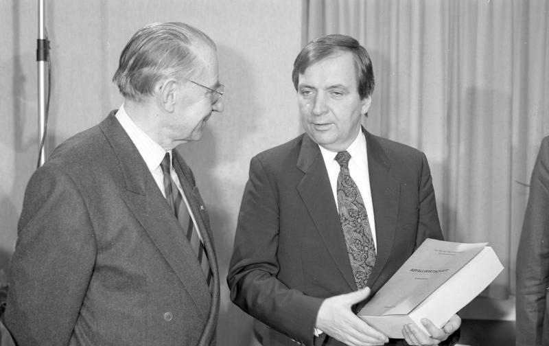 13.11.1990 Vorstellung des Sondergutachtens zur Abfallwirtschaft des Sachverständigenrates für Umweltfragen. Der Vorsitzende des Sachverständigenrates übergibt das Sondergutachten Bundesminister für Umwelt, Prof.Dr. Klaus Töpfer, im Bundesministerium für Umwelt.